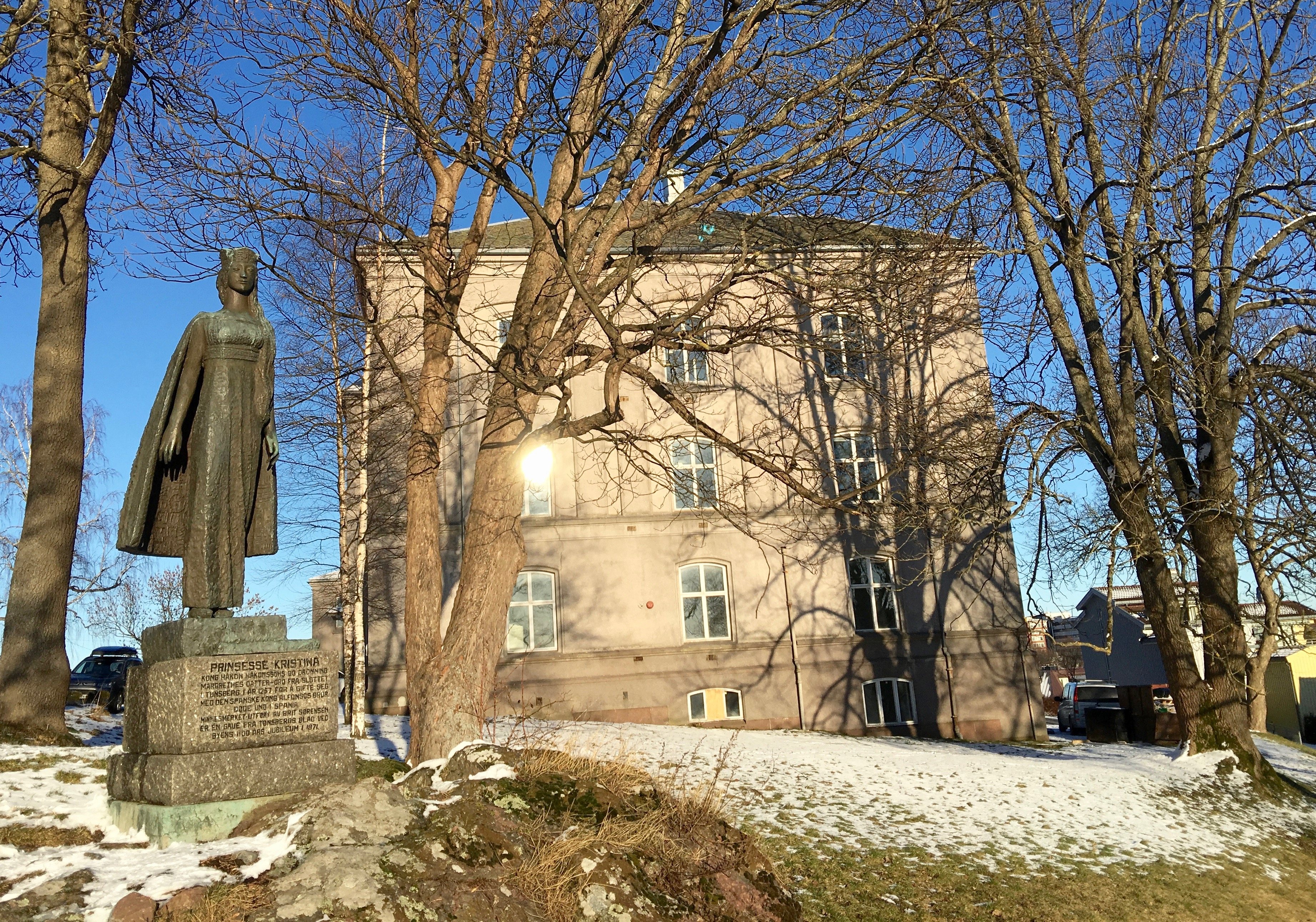 Slottsfjellskolen i Tønsberg i Vestfold med Britt Sørensens statue «Kristina av Tunsberg» ved veien opp til Slottsfjellet. 15. februar 2016. Slottsfjellskolen fra 1884 ble nedlagt som barneskole i 1982, men seinere tatt i bruk som videregående skole.